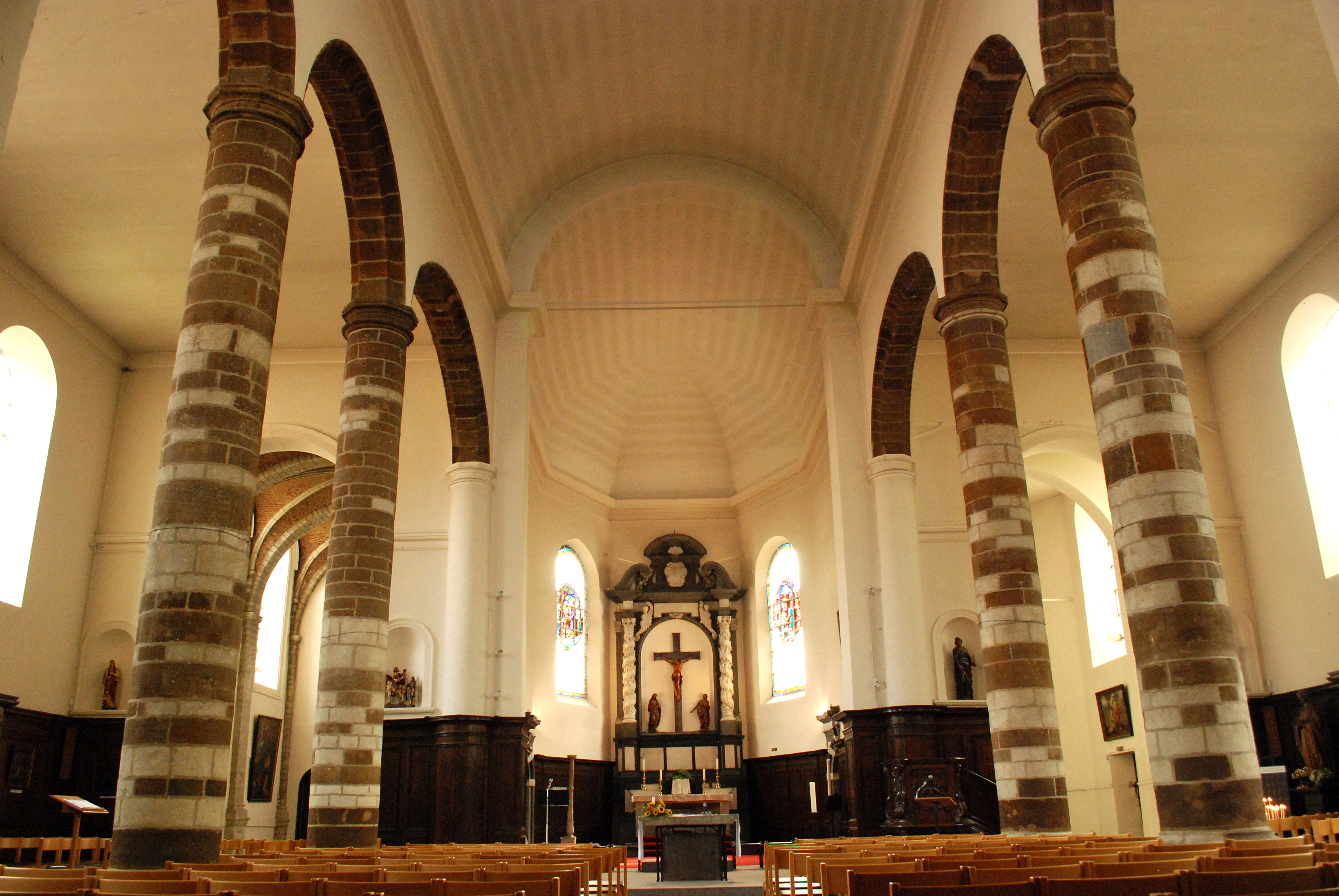 Belgique - Wallonie - Wavre - Église Saint-Martin de Limal